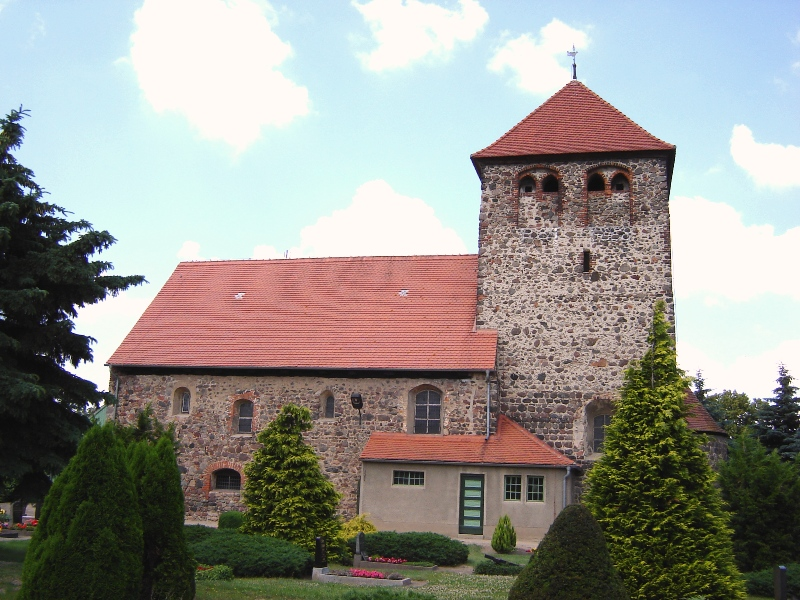 Kirche Hohenseeden, Sachsen-Anhalt, Nordansicht